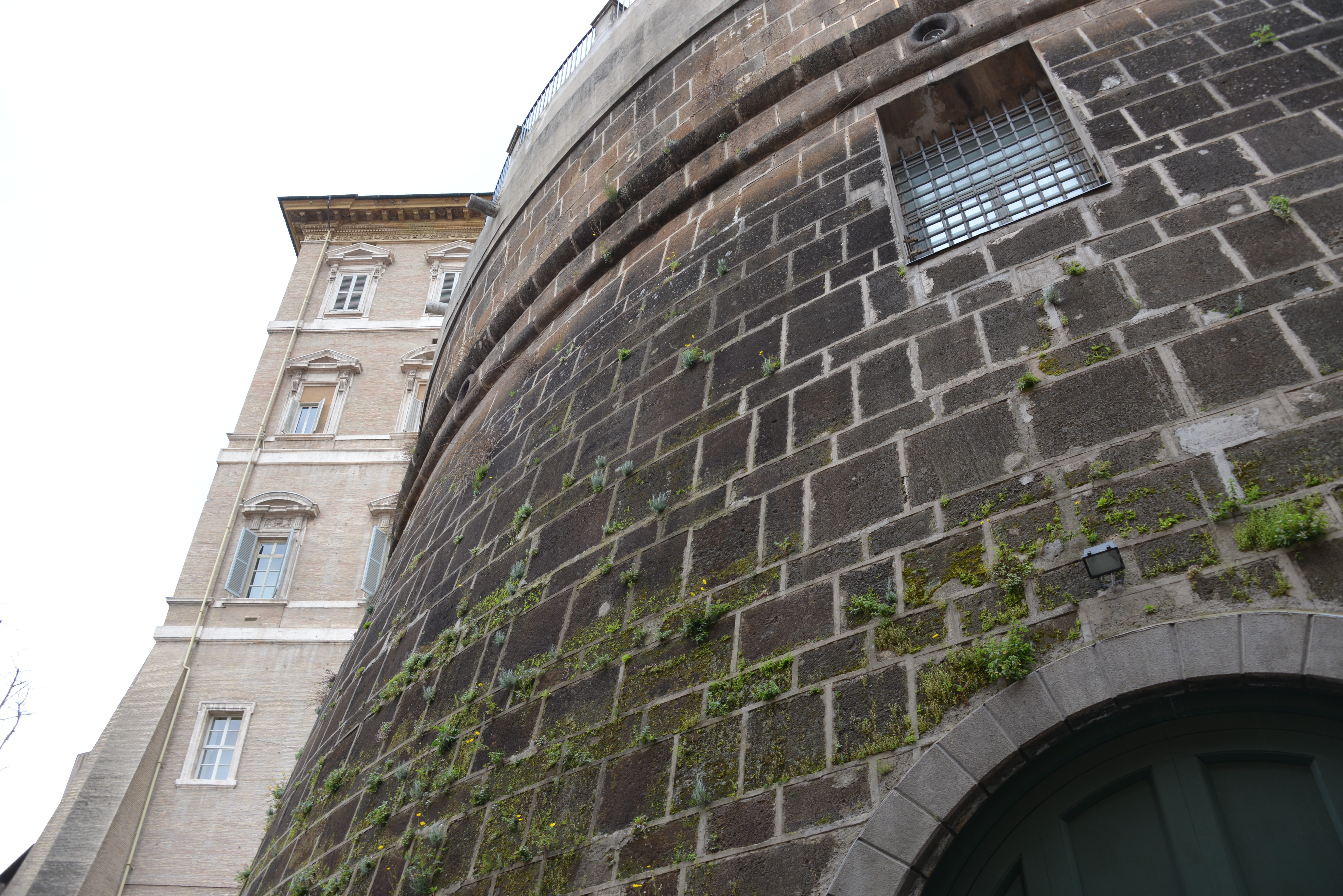 Torre di Niccolò V (auch Torrione Niccolò V, erbaut 1473 als Verteidigungswerk, seit 1942 Sitz der Vatikanbank IOR), im Hintergrund der Apostolische Palast